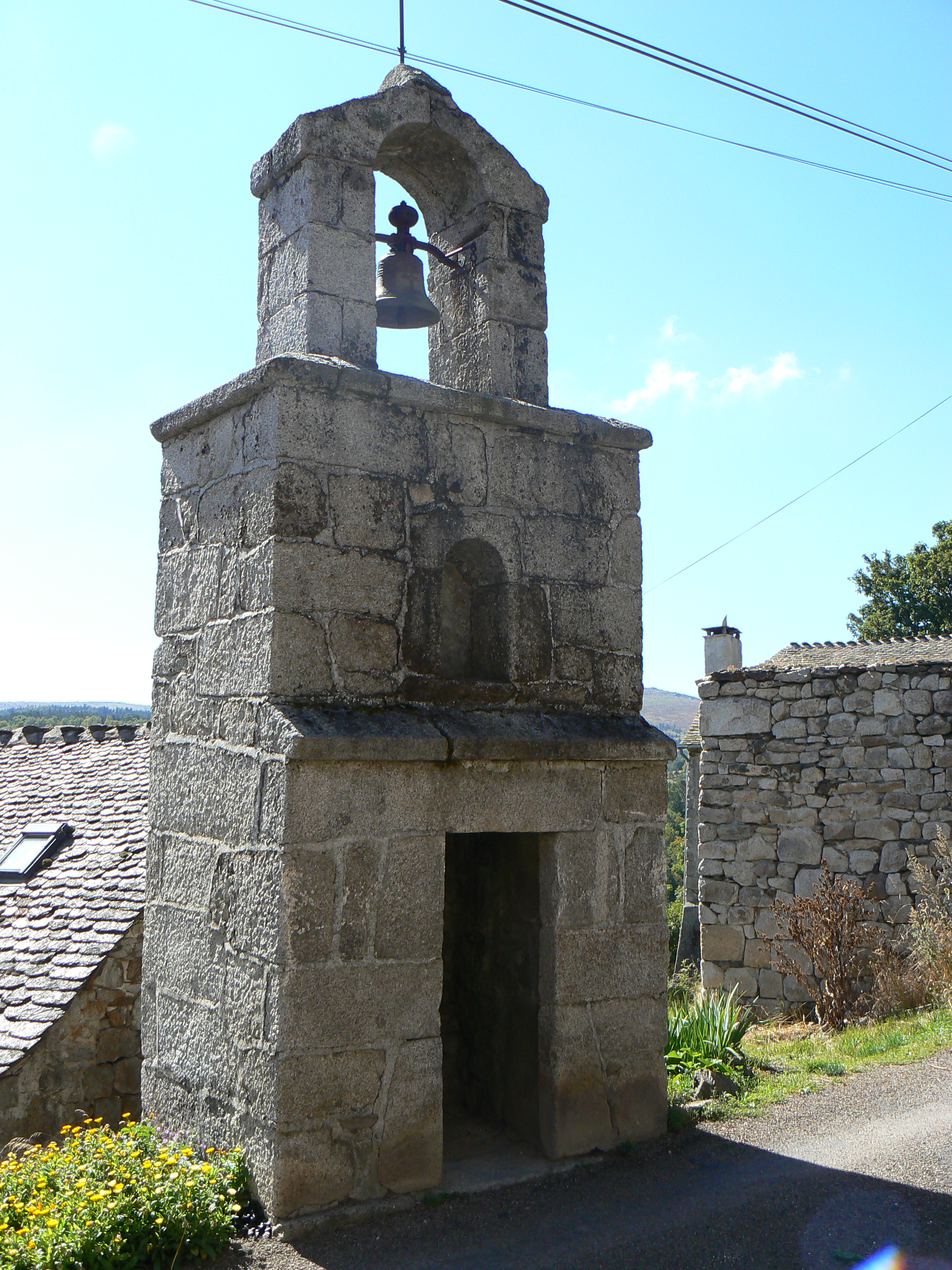 Clocher de tourmente du hameau de Servies, commune de Mas-d'Orcières, Lozère, France